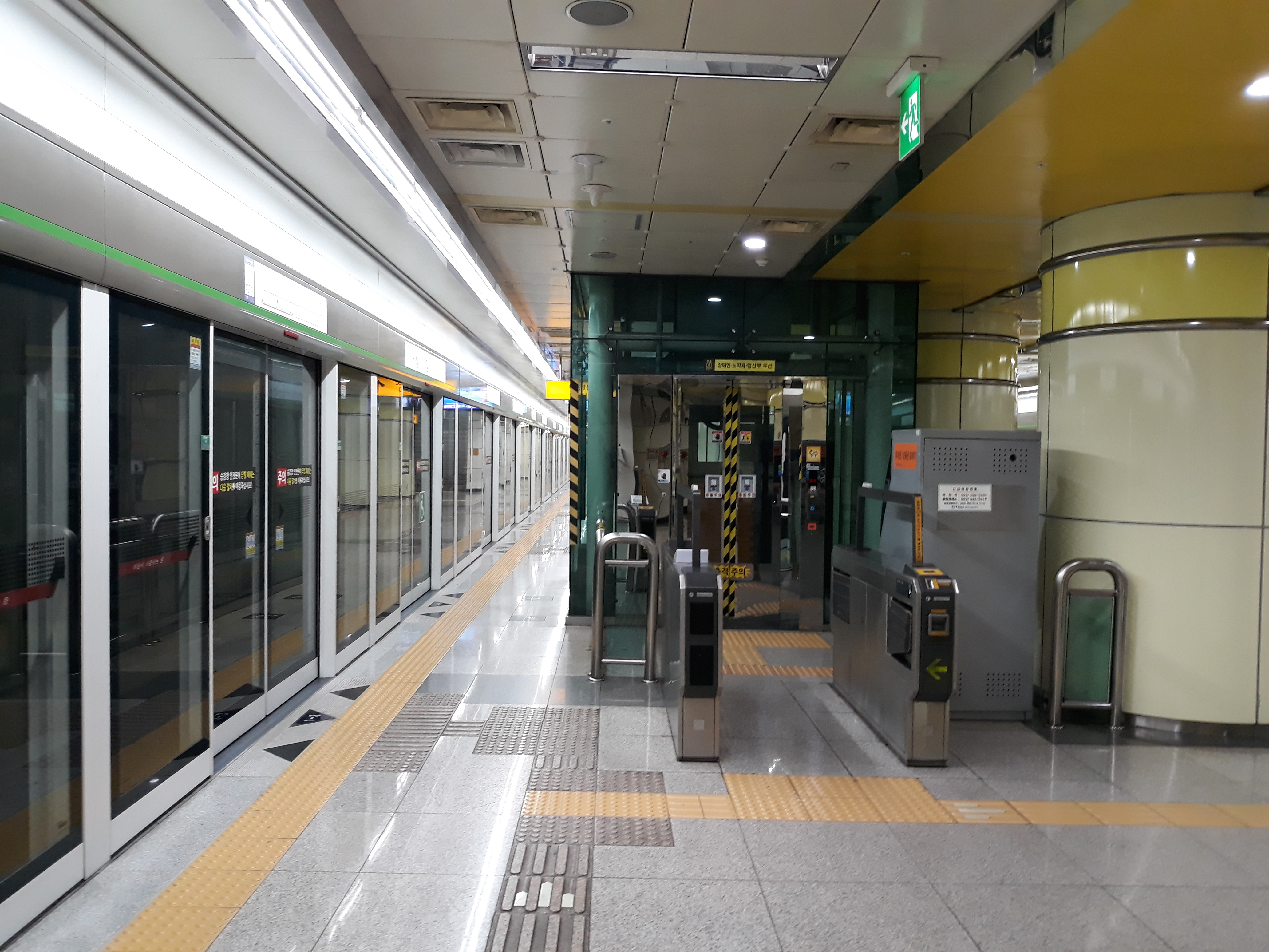 죽전역 승강장(문양 방면)